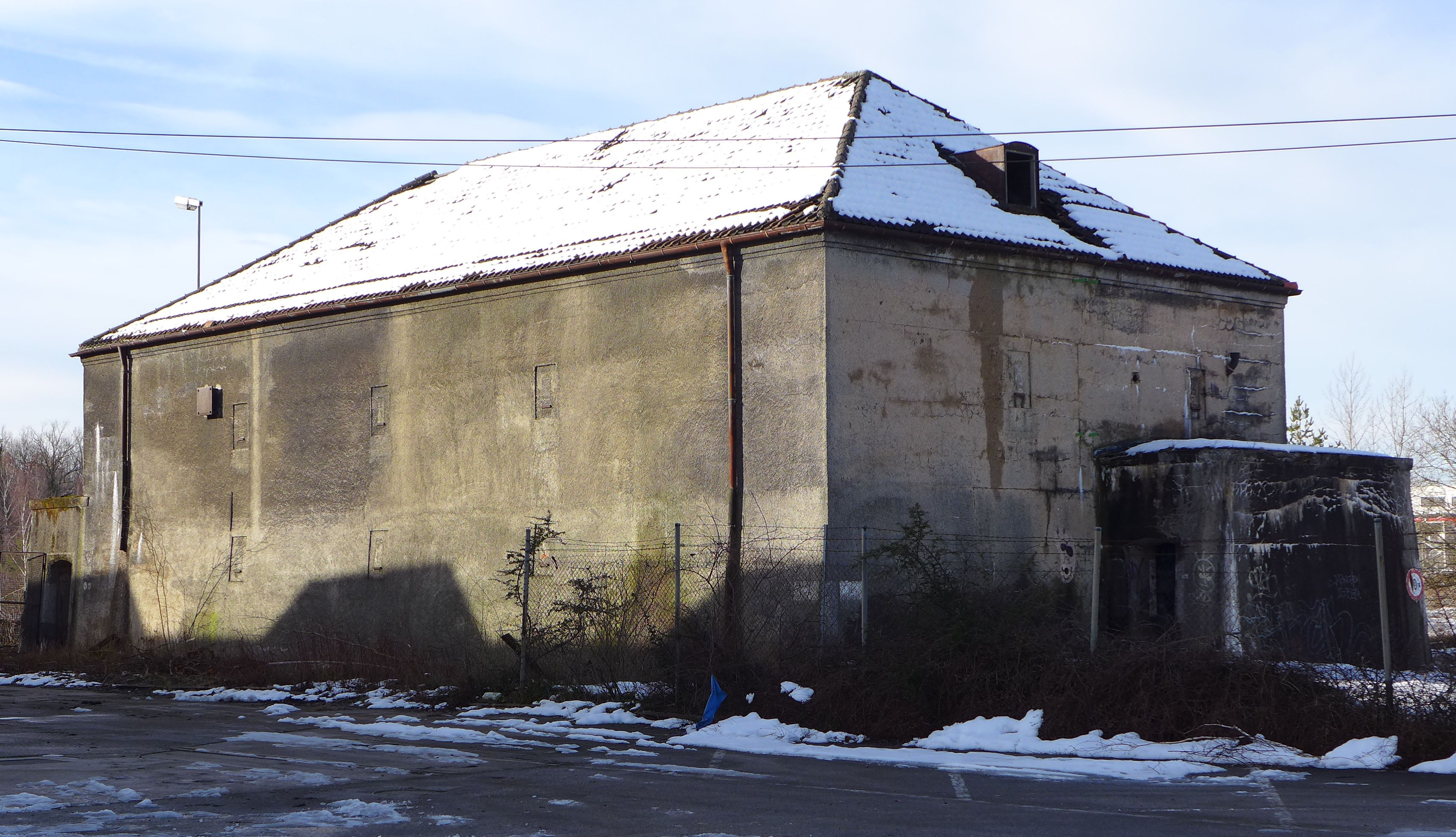 Papinstr. 53 Bunker, München